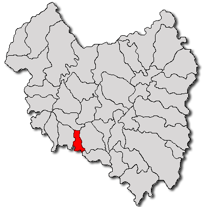 Categorie:Hărţi ale judeţului Covasna